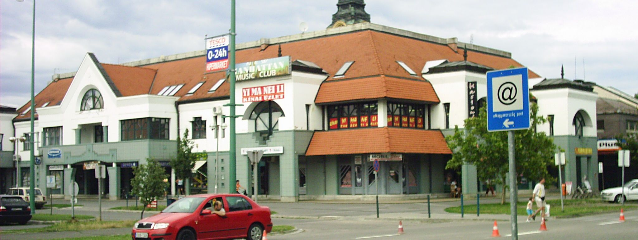 Kiskunfélegyháza, városközpont, üzletház, Gorkij utca